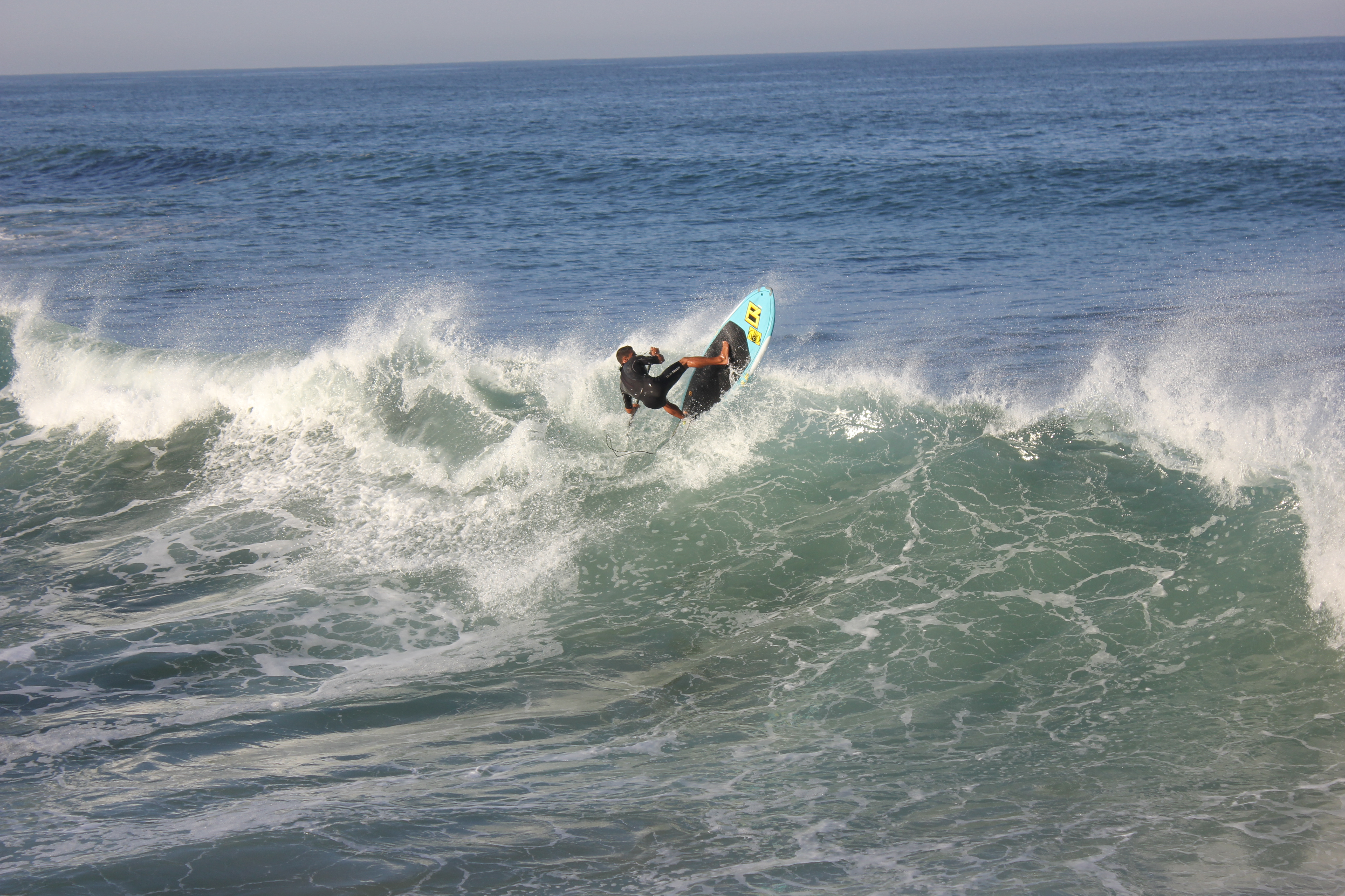 איציק חורש גולש סאפ 2014